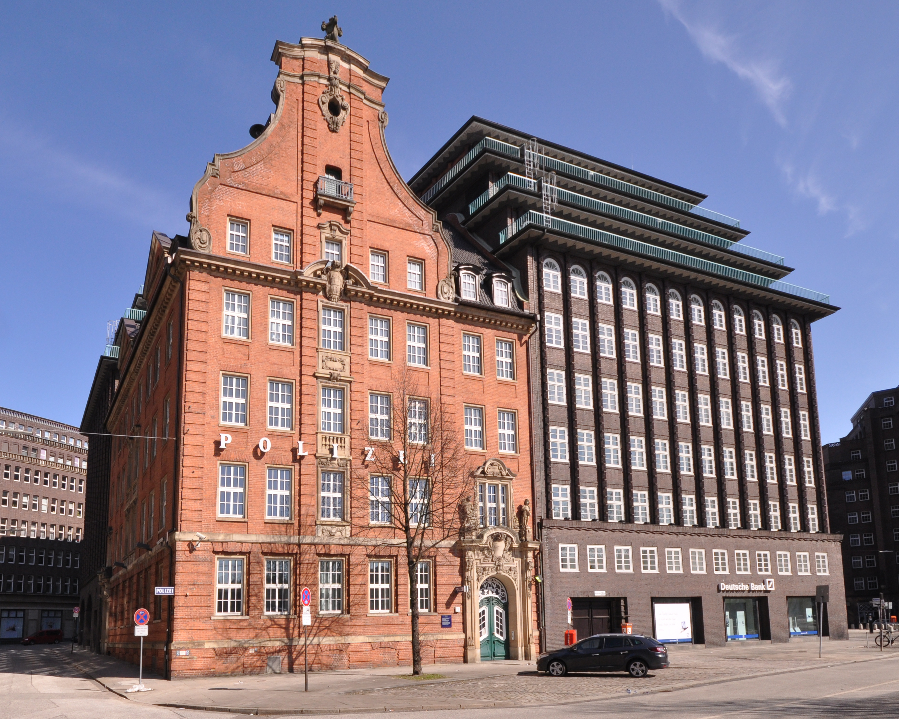 Ehemaliges Haus der Landherrenschaft am Klingberg 1 in Hamburg-Altstadt. This is a photograph of an architectural monument.